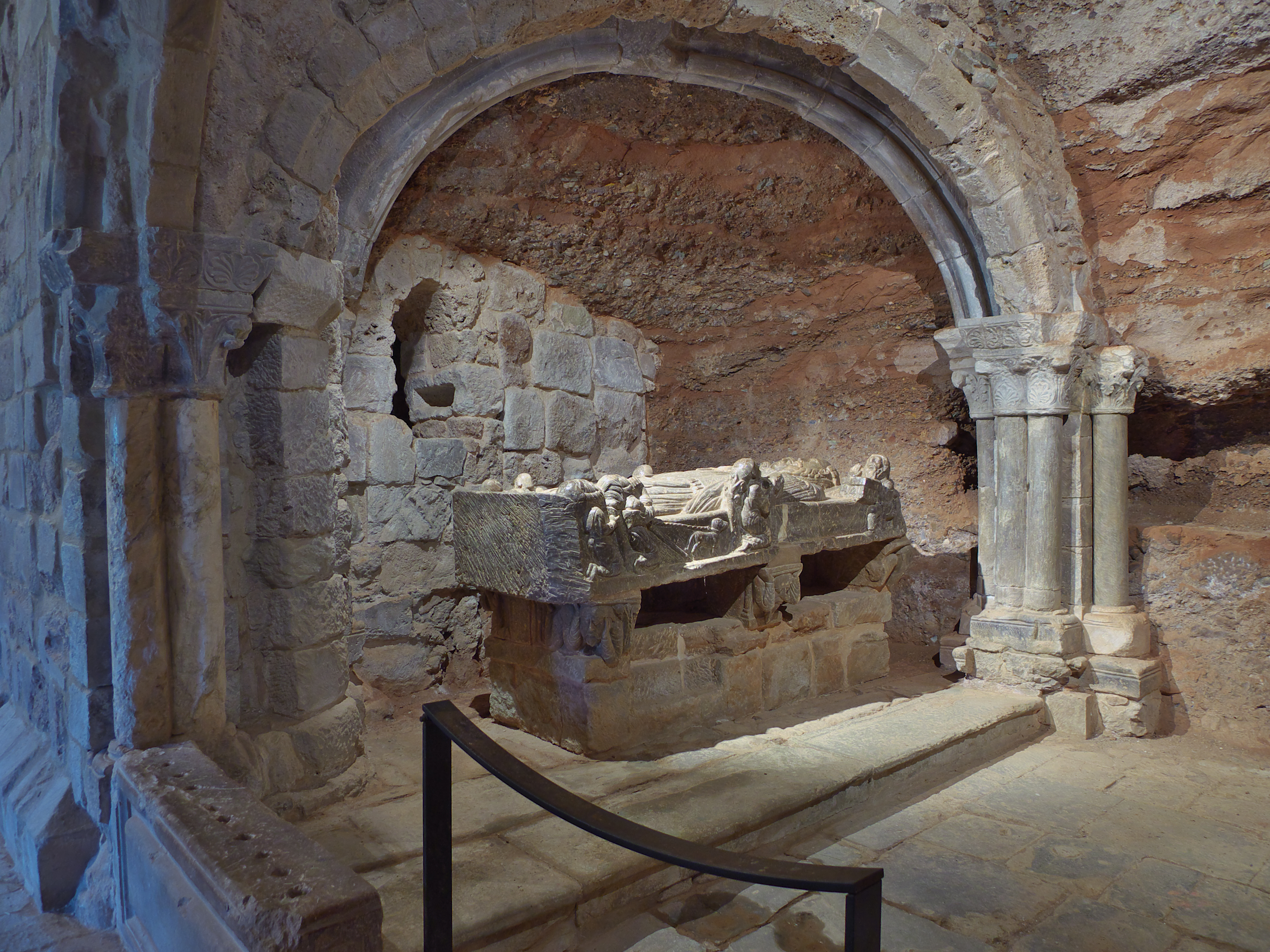 A finales del siglo XII se situó el cenotafio de San Millán en esta cueva eremítica del Monasterio de Suso que fué su oratorio.